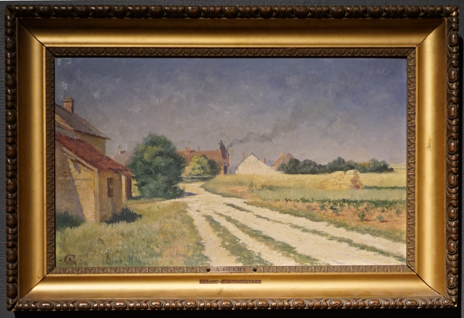 au musée st-Denis de Reims lors de la Nuit des Musées à Reims en 2019.